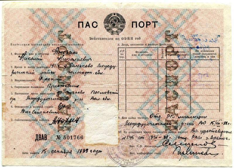 Паспорт. Выдан Анохину Н. Н. Отделением РК милиции Междуреченского района ВО. 15 декабря 1938 г. Период создания: 1938 г. Материал, техника: бумага , чернила, печать Размер: 14,4 см; 20,1 см. 1 Место создания: СССР Номер в Госкаталоге: 13410957 Номер по ГИК (КП): МРХКМ-2878/10 Инвентарный номер: дк-1198 Местонахождение Муниципальное бюджетное учреждение культуры "Междуреченский районный художественно-краеведческий музей" Лист бумаги с водяными знаками. 14,4 см, 20,1 см. Типографская печать. Графы бланка заполнены от руки черными чернилами. Документ подписан начальником районного комитета милиции и начальником паспортного стола, также имеется подпись получателя.